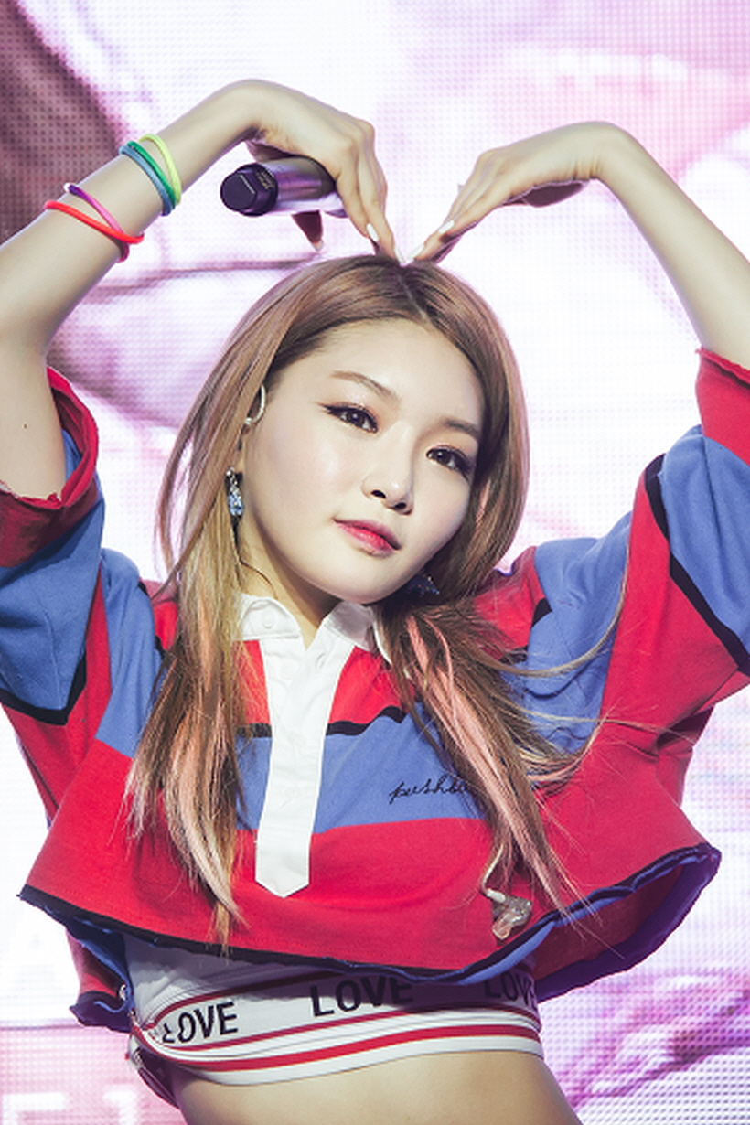 170607 김청하 데뷔 쇼케이스 12 pic (3)